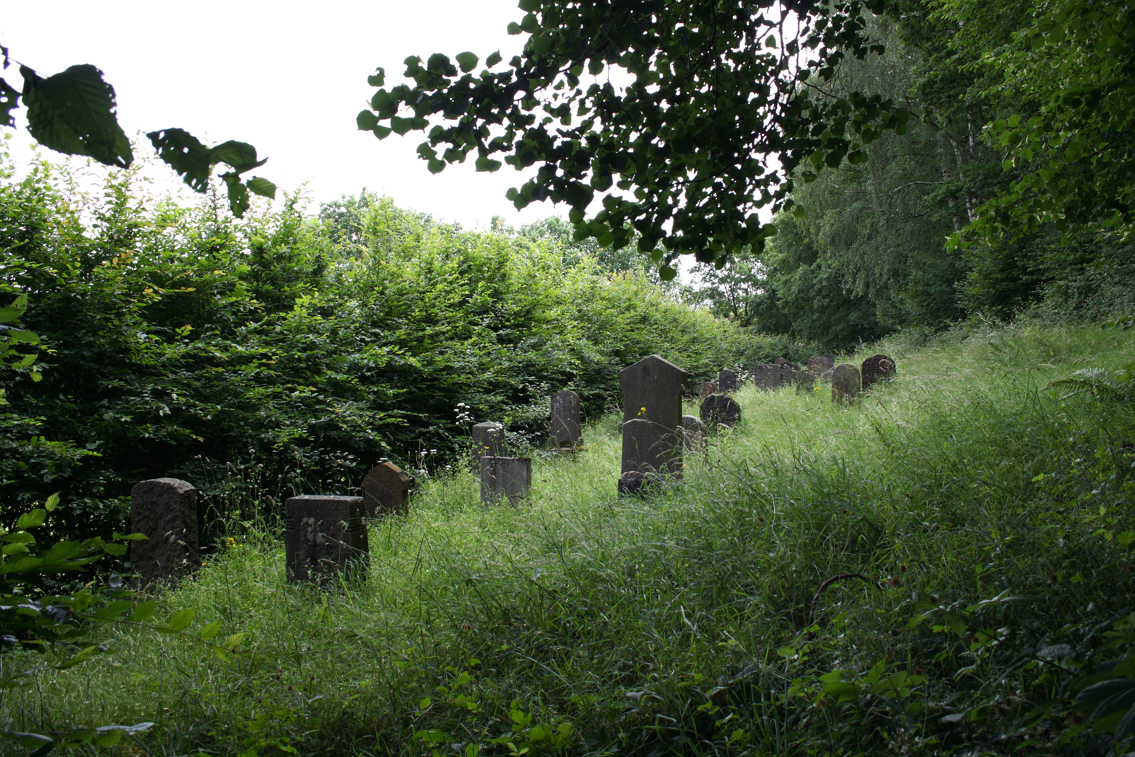 Jüdischer Friedhof in Aufenau, einem Ortsteil von Wächtersbach im Main-Kinzig-Kreis (Hessen)